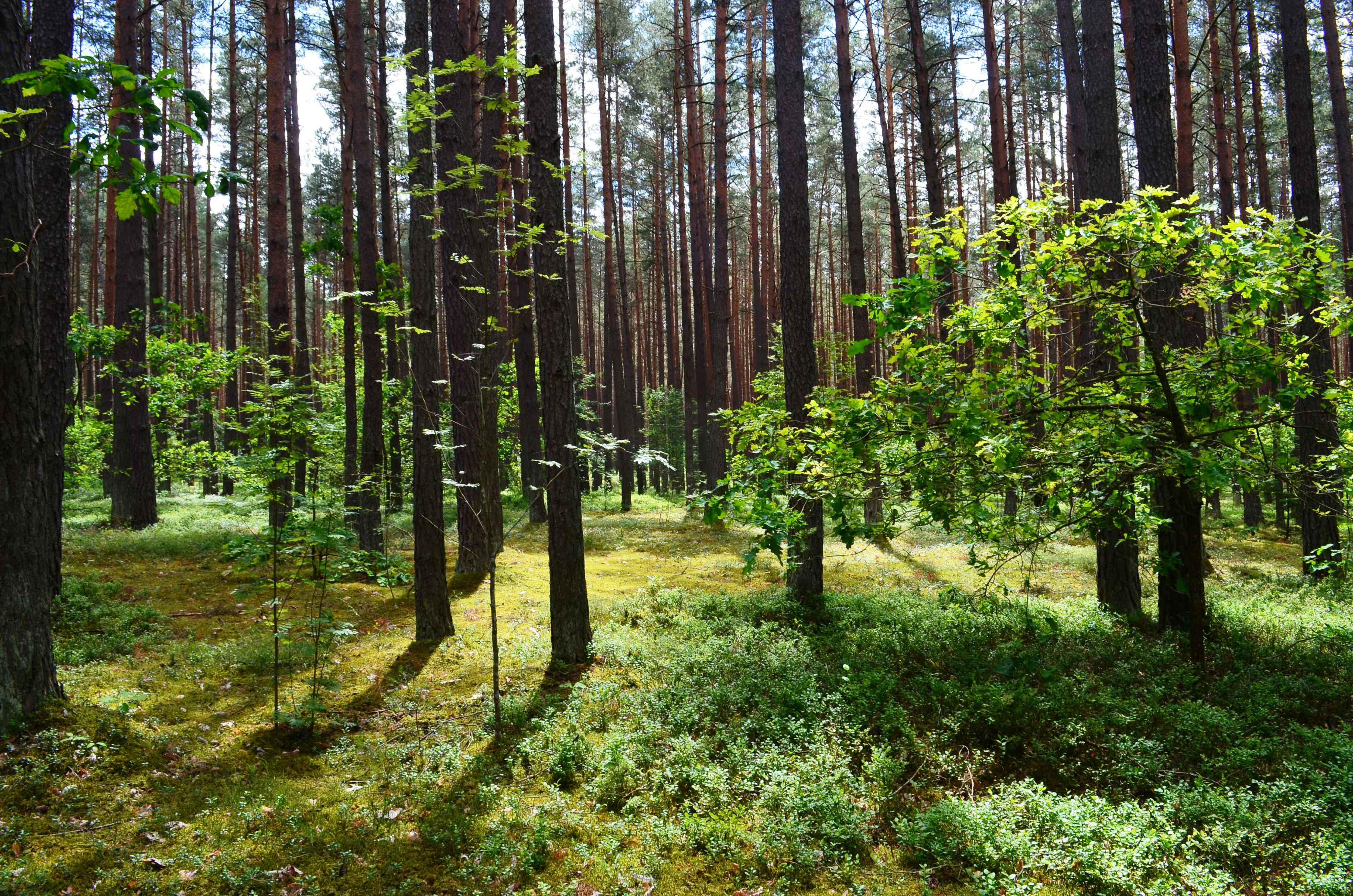 Aukštagirio miškas netoli Smėlynės, Vilnius